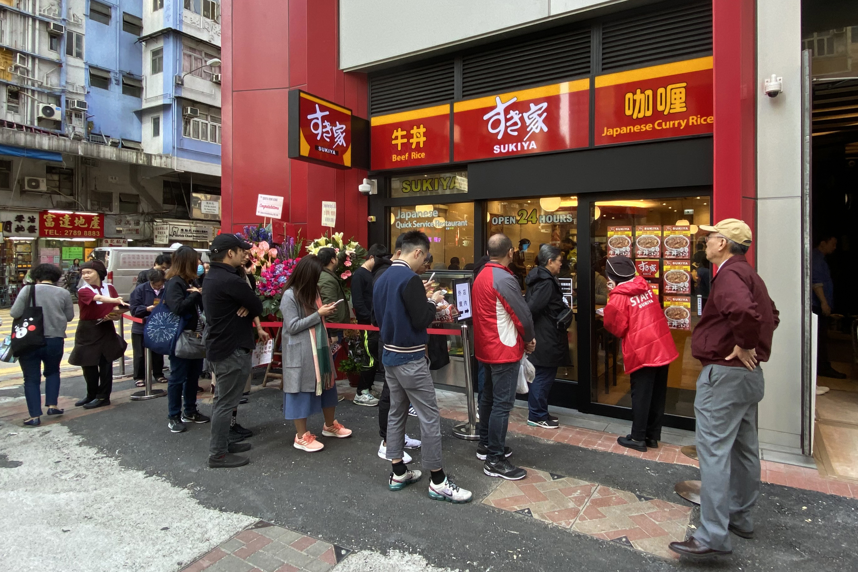 L'hotel Nina et Convention Centre